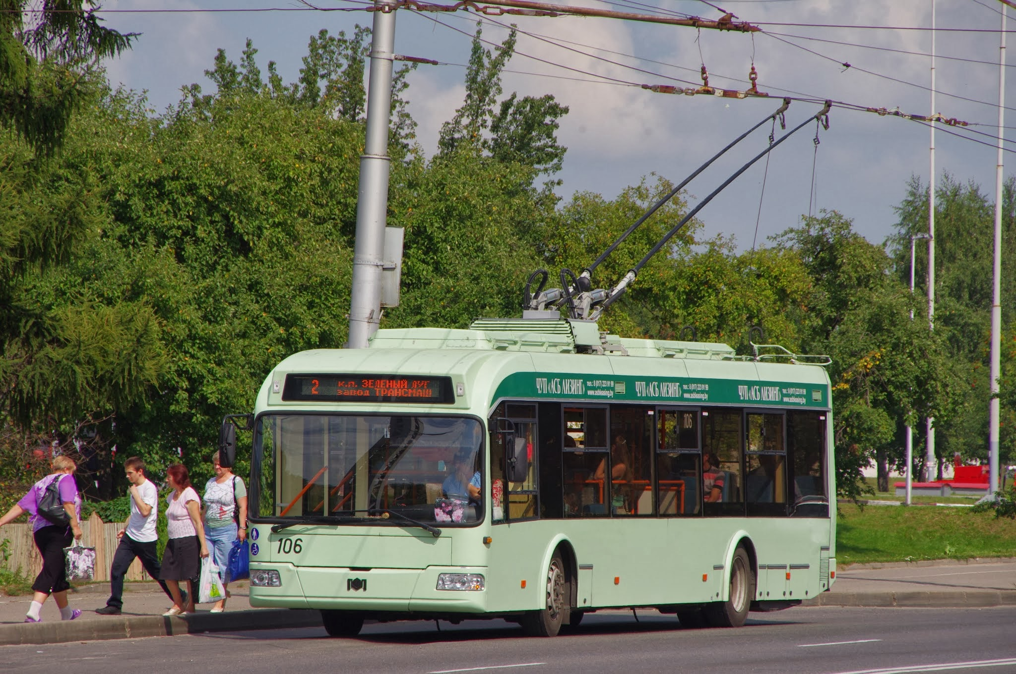 Рабочий пос., Могилёв, Belarus